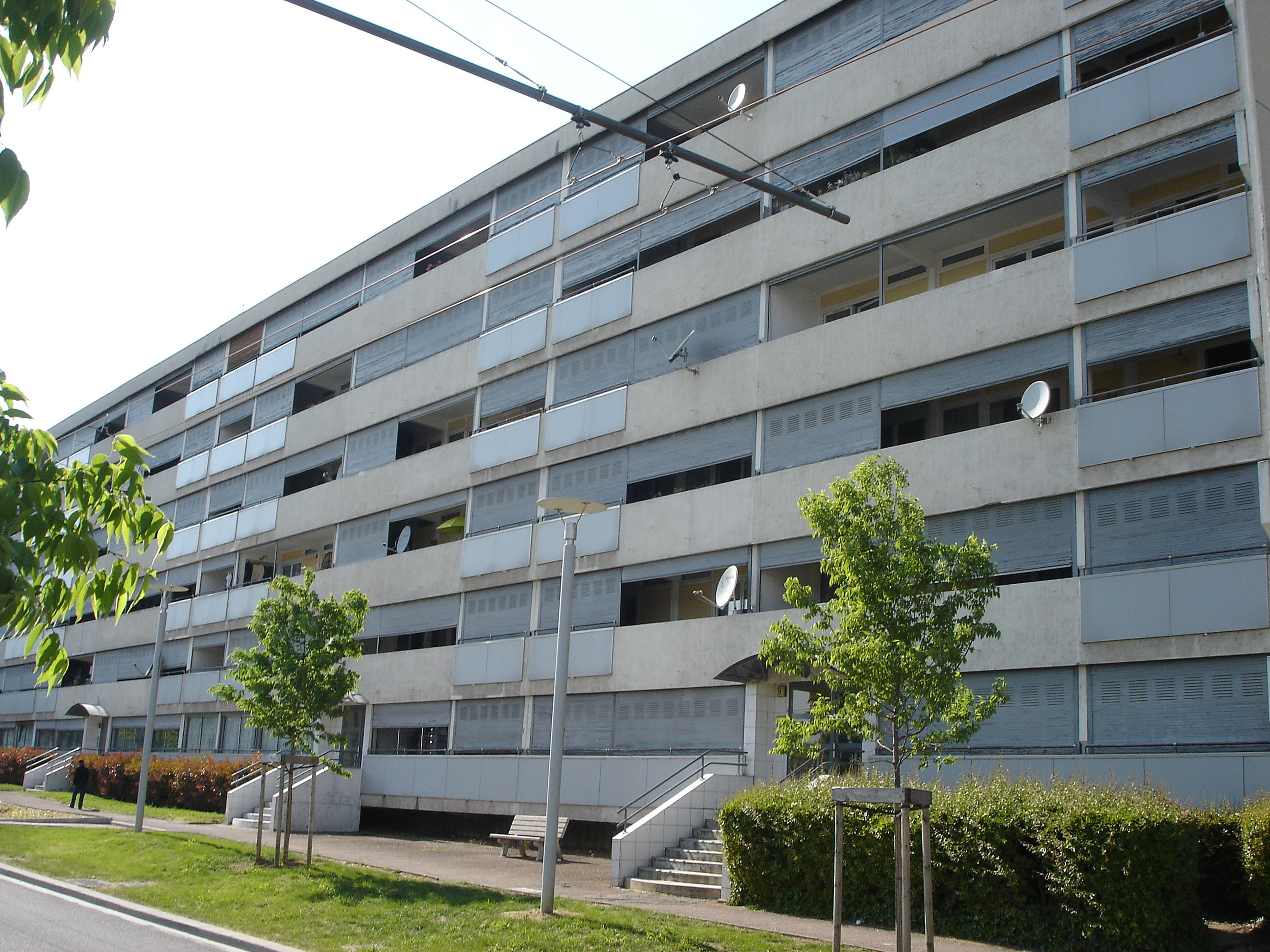 Immeuble Rillieux-la-Pape dans le Rhône en France.